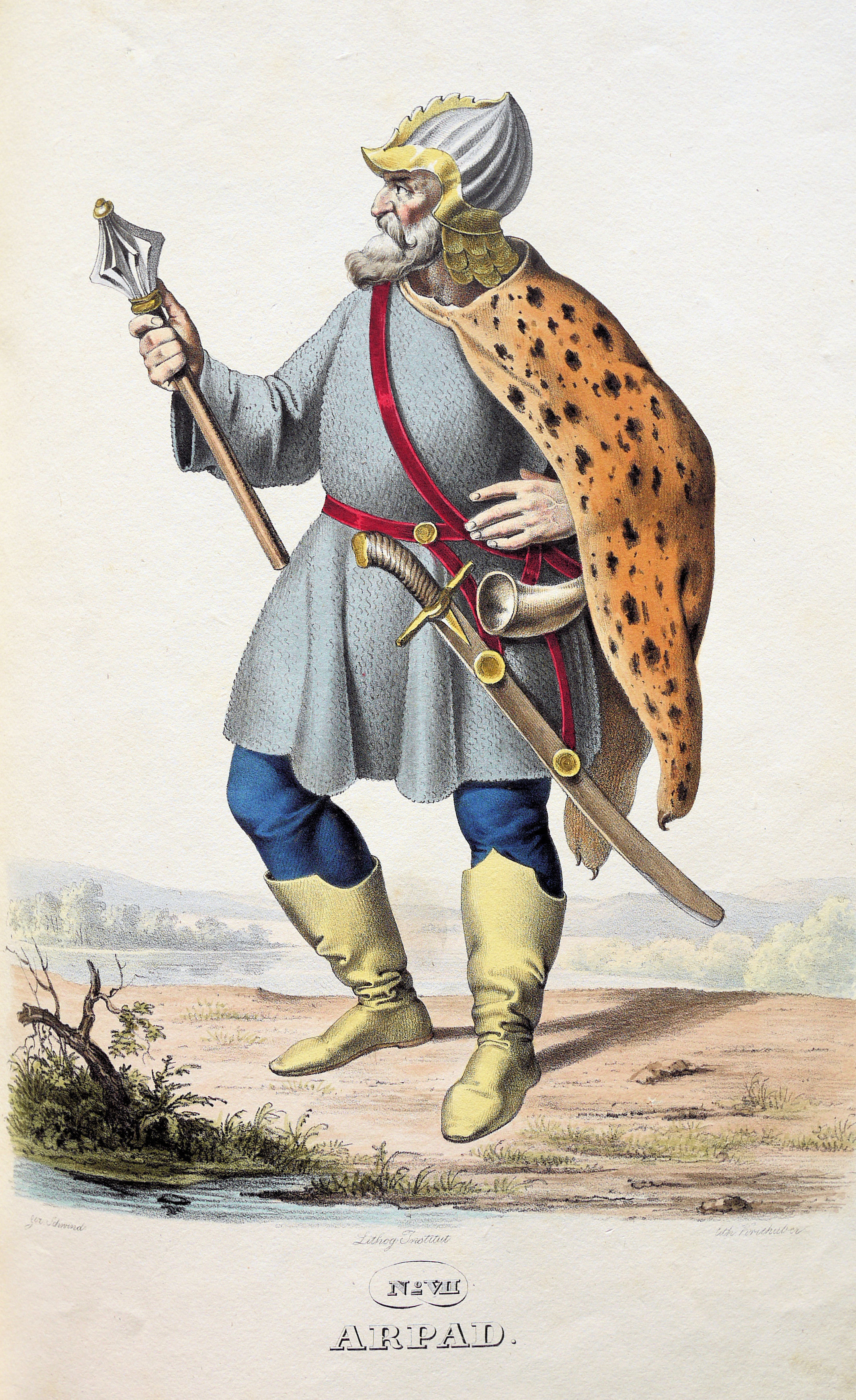 Árpád, Lithographie von Josef Kriehuber nach einer Zeichnung von Moritz von Schwind aus Ungerns Erste Heerführer Herzoge und Koenige In einer Reihe von Bildnissen von Bela bis auf Seine Majestät Franz I. Kaiser Von Österreich König Von Ungern &c., &c. Wien : Lithographisches Institut ;ca. 1828